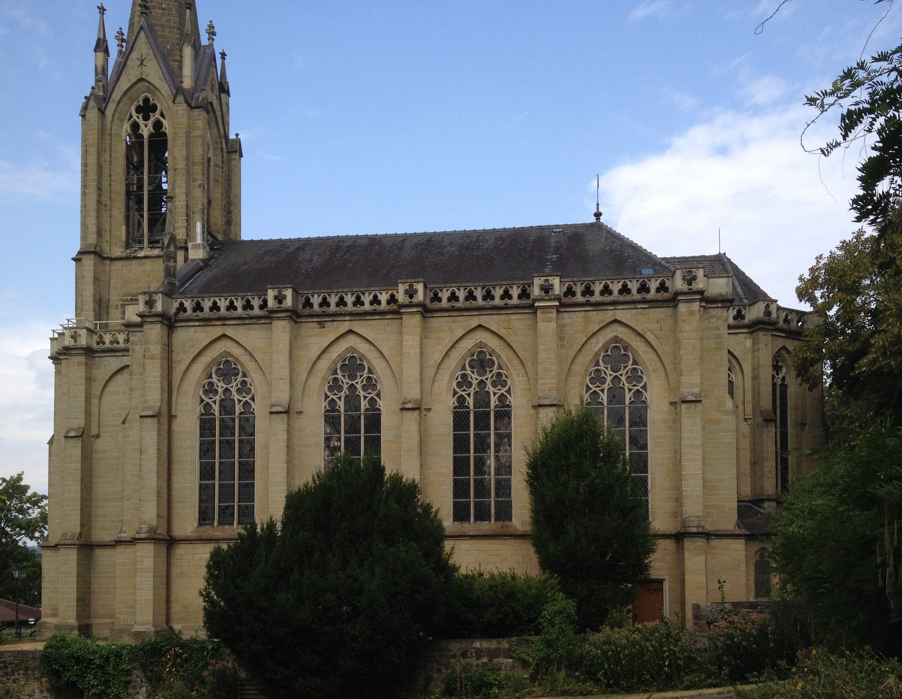 Bad Pyrmont, ev.-luth. Christuskirche